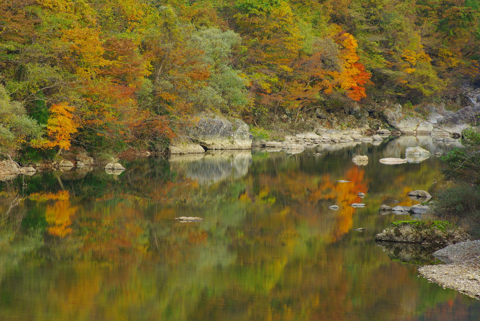 抱返り渓谷 Dakigaeri Gorge